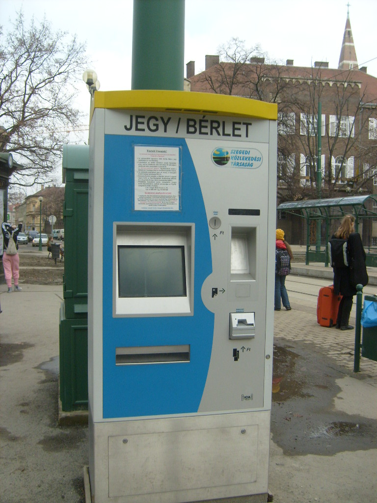 Jegy/Bérlet automata Szegeden